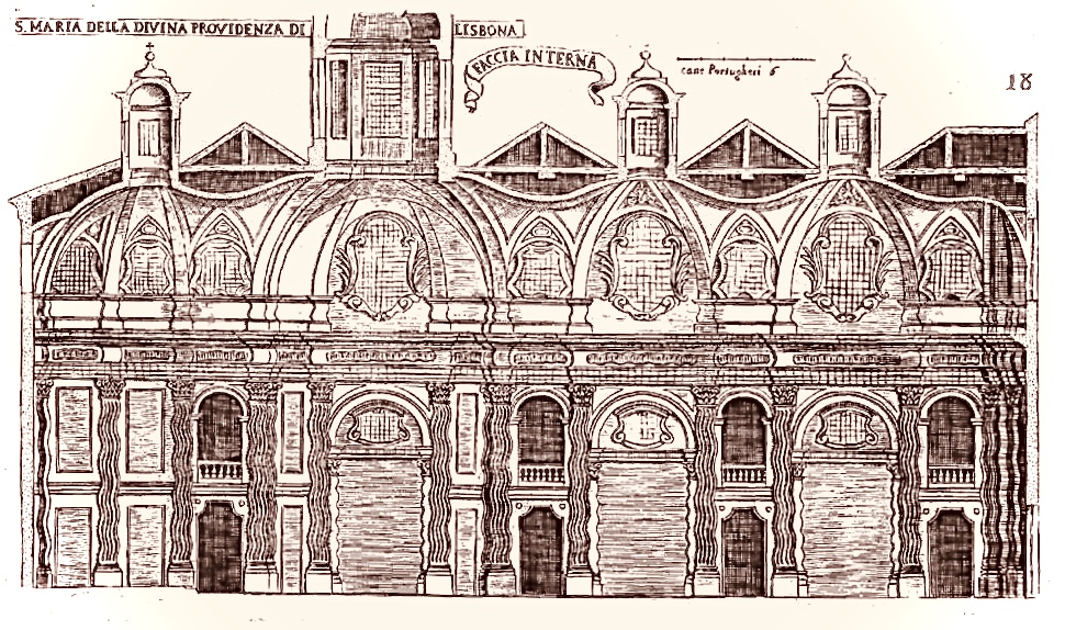 Chiesa di Santa Maria della Provvidenza, Lisbona. Da Guarino Guarini, 1698. Distrutta nel Terremoto di Lisbona del 1755